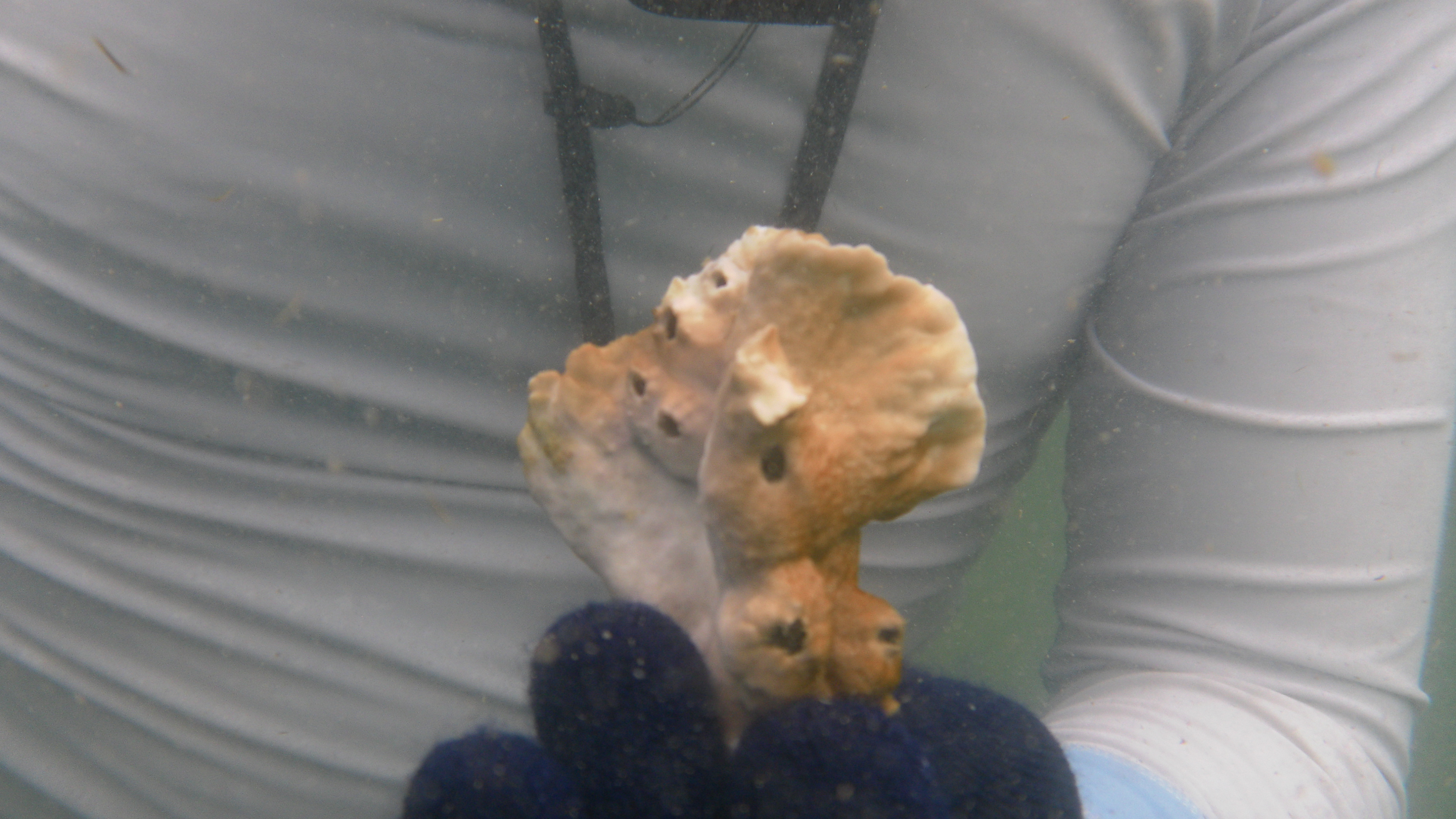 Parte de un coral de fuego plano de la región de Taganga en Santa Marta, Colombia